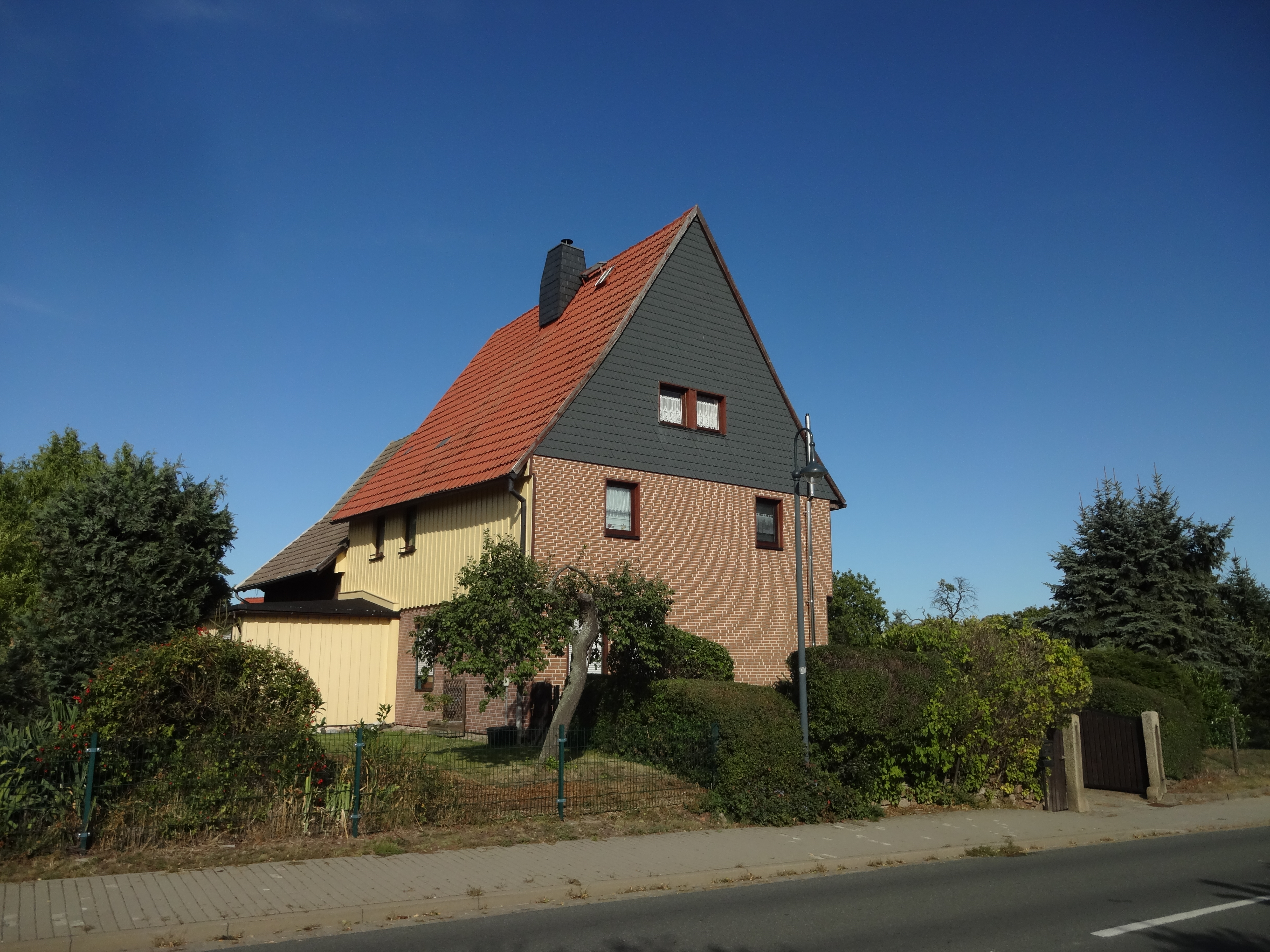 ehemals denkmalgeschütztes Wohnhaus in der Ilsenburger Straße 10 in Drübeck